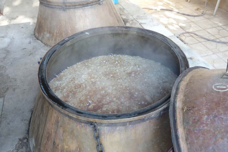 در فرآیند گلاب گیری، گل محمدی را به همراه آب جوش در یک دیگ گلاب گیری می ریزند تا پس از مدتی گلاب به دست آید.